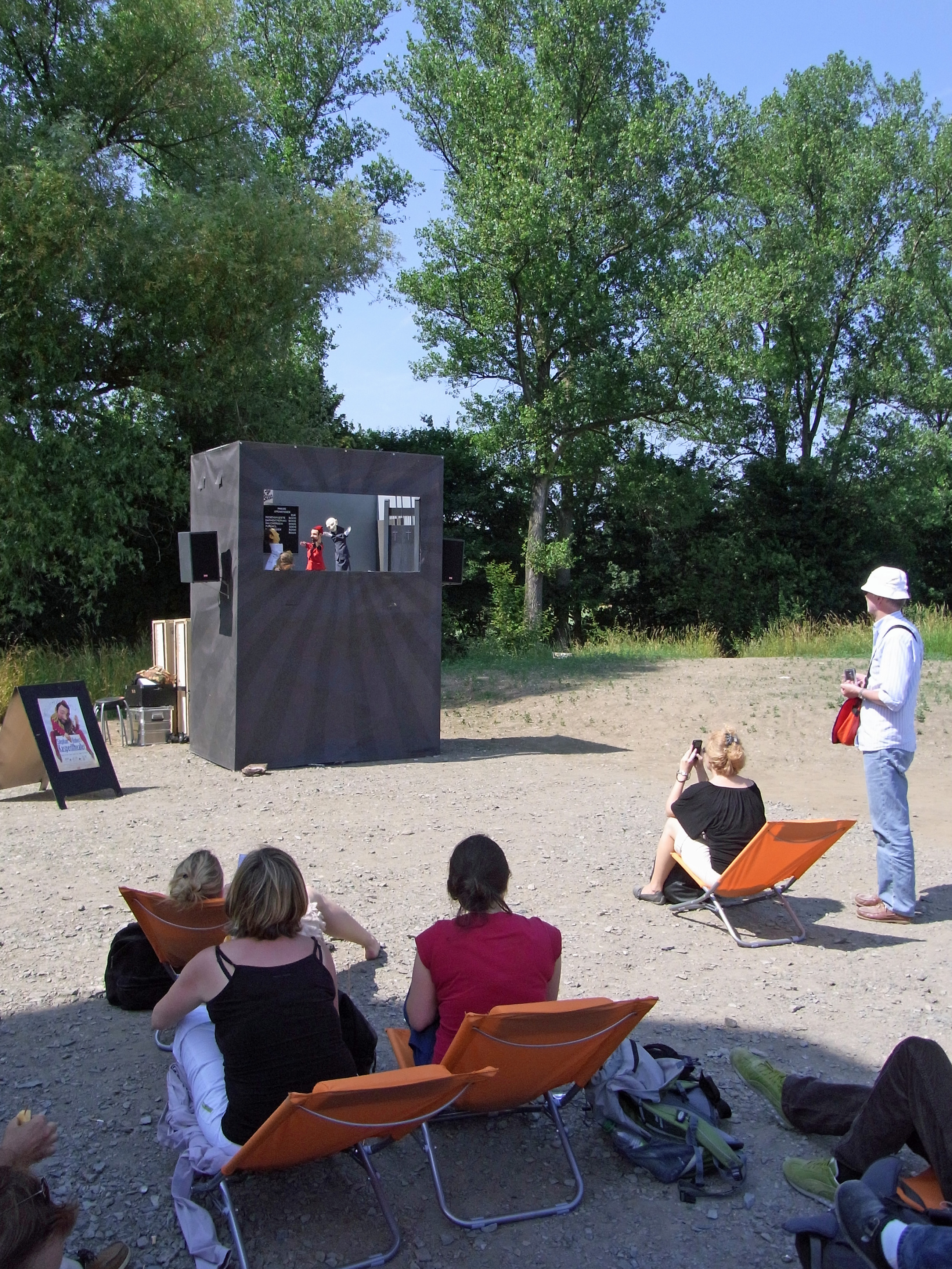 Emscherkunst.2010 Stephan Huber: 3 Kasperl Theater für das Ruhrgebiet Mobile Bühne; Aufführungen an wechselnden Ausstellungsorten. Hier am Walkway and Tower